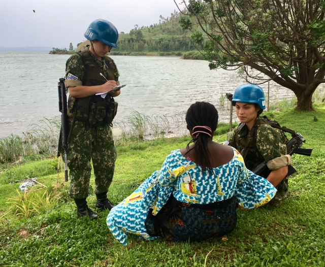 Province du Sud Kivu, RD Congo : La participation des femmes dans les opérations de maintien de la paix est vitale pour les Nations Unies. Sur cette photo, les femmes casques bleus uruguayennes sensibilisent les femmes congolaises sur leur bien-être. Photo MONUSCO/Force == South Kivu Province, DR Congo: Women participation in Peacekeeping Operations is vital for the United Nations. On this picture, Uruguayan Female Peacekeepers in DRC are sensitizing Congolese women for their wellbeing. Photo MONUSCO/Force